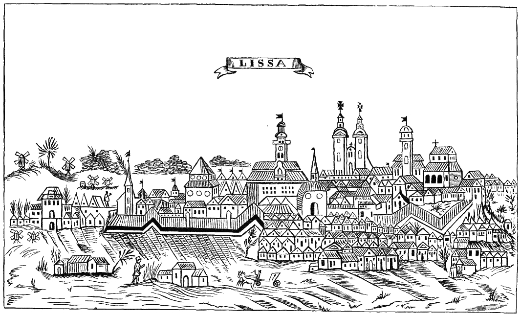 Widok miasta Leszna podług ryciny z roku 1775